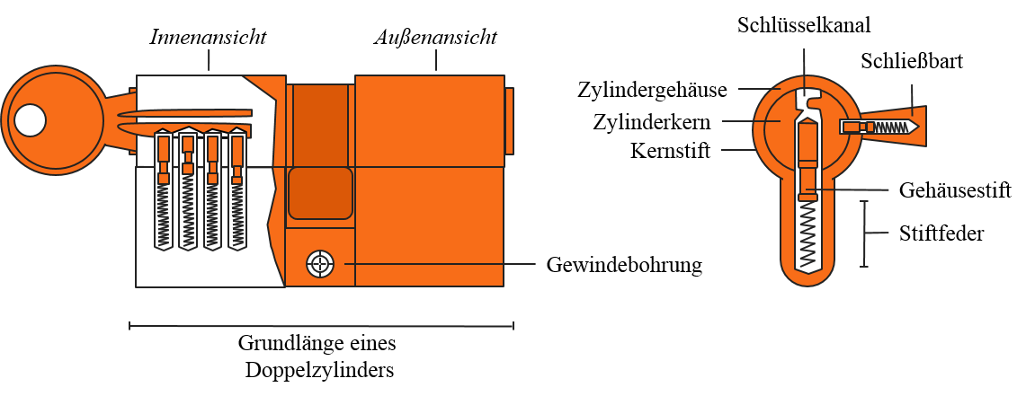 Schließzylinder-Aufbau und Innenansicht.